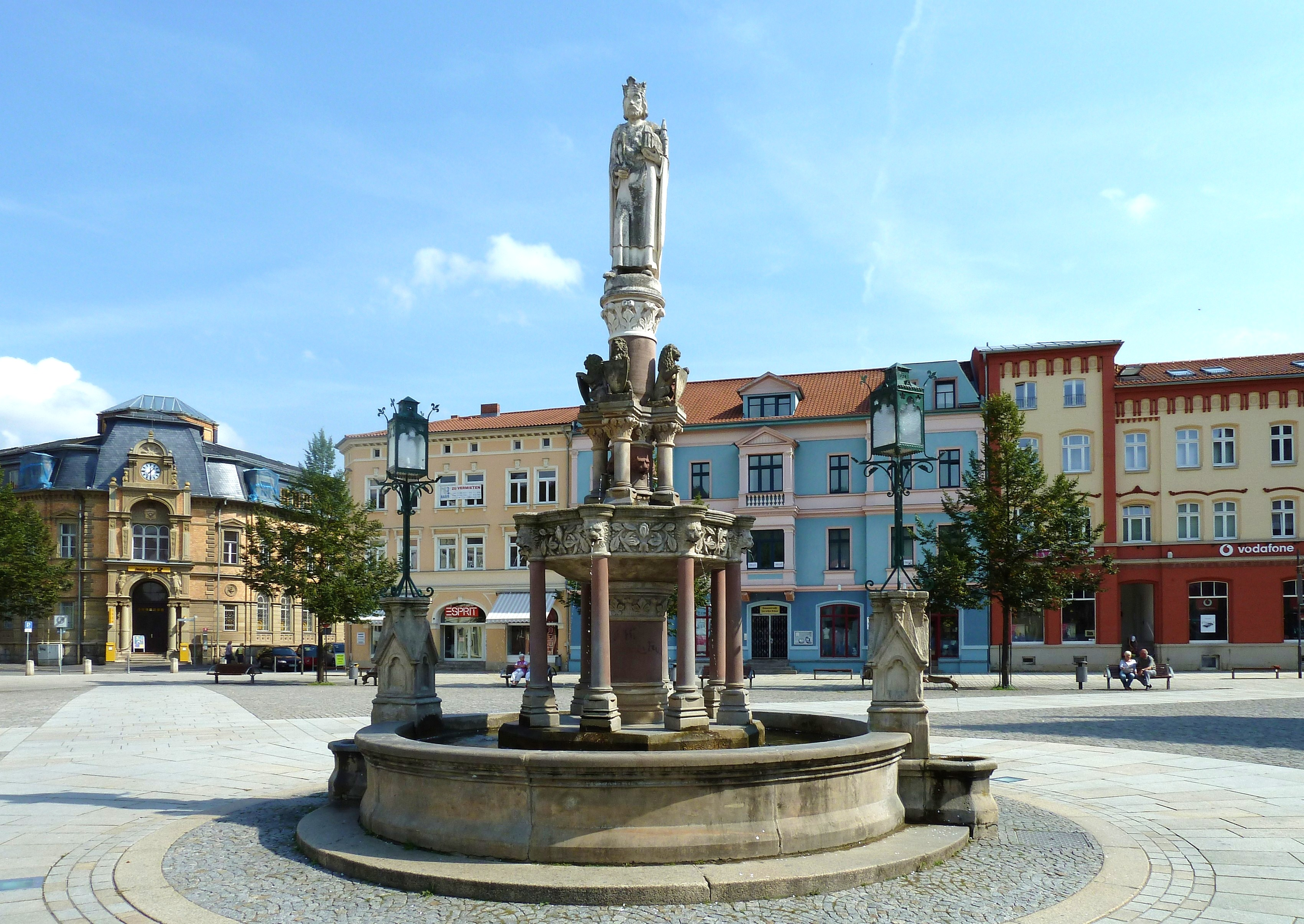 Heinrichbrunnen auf dem Markt in Meiningen, errichtet 1872, links das Postamt